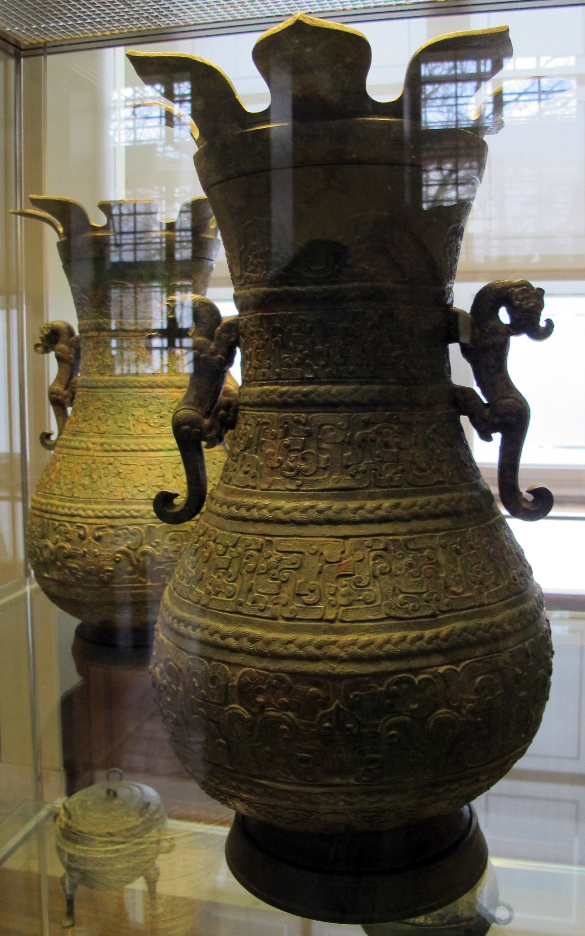 Periodo degli zhou dell'est, coppia di vasi rituali hu. V sec. ac.